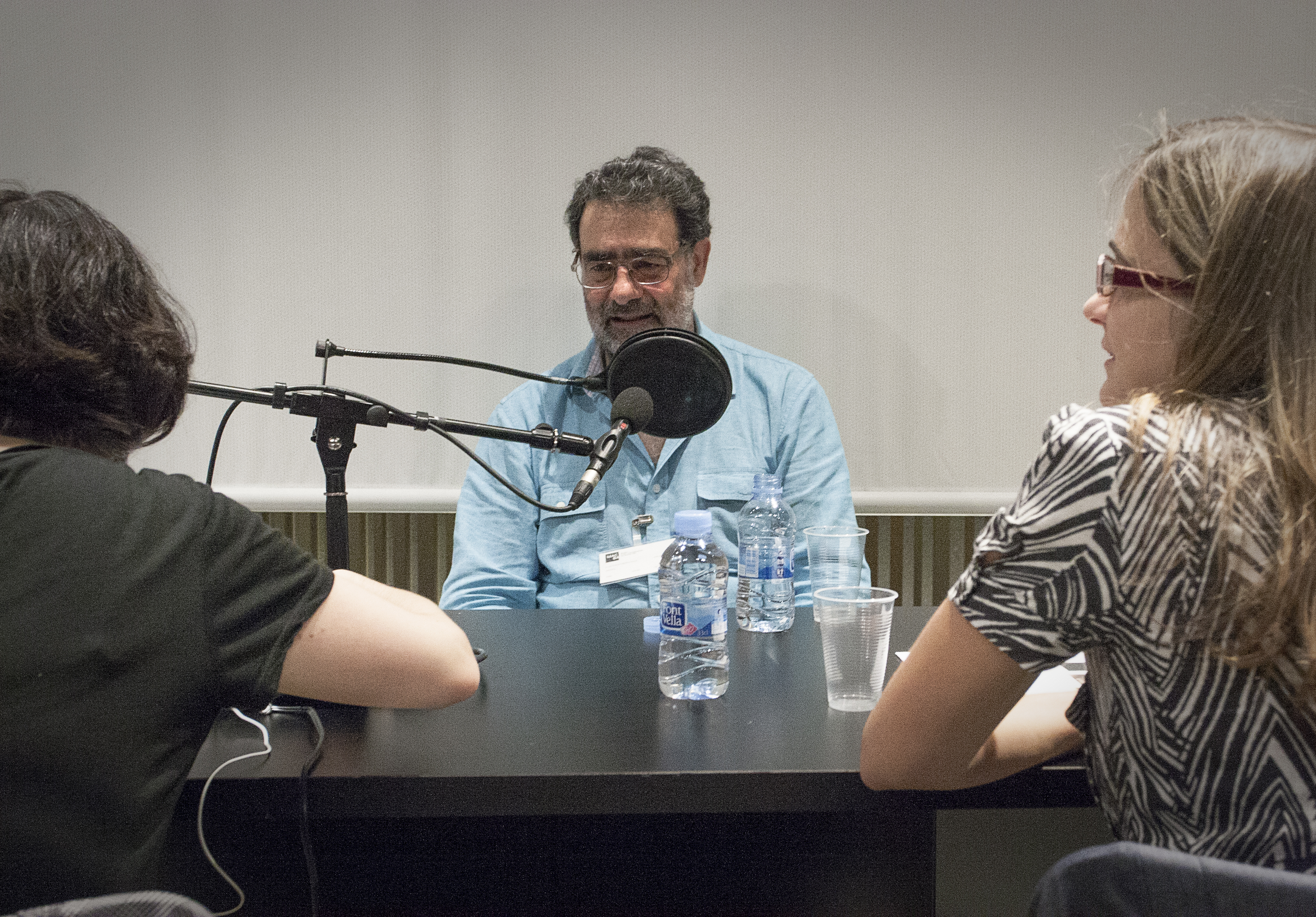 Joan Fontcuberta entrevistat a Ràdio Web Macba